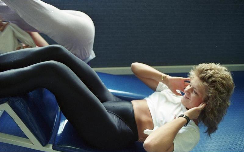 Juni 1988 Bonn, Fitnesscenter